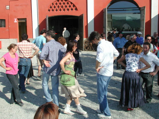 foto mia personale,2006 Categoria:Immagini di danza Categoria:Immagini delle quattro province